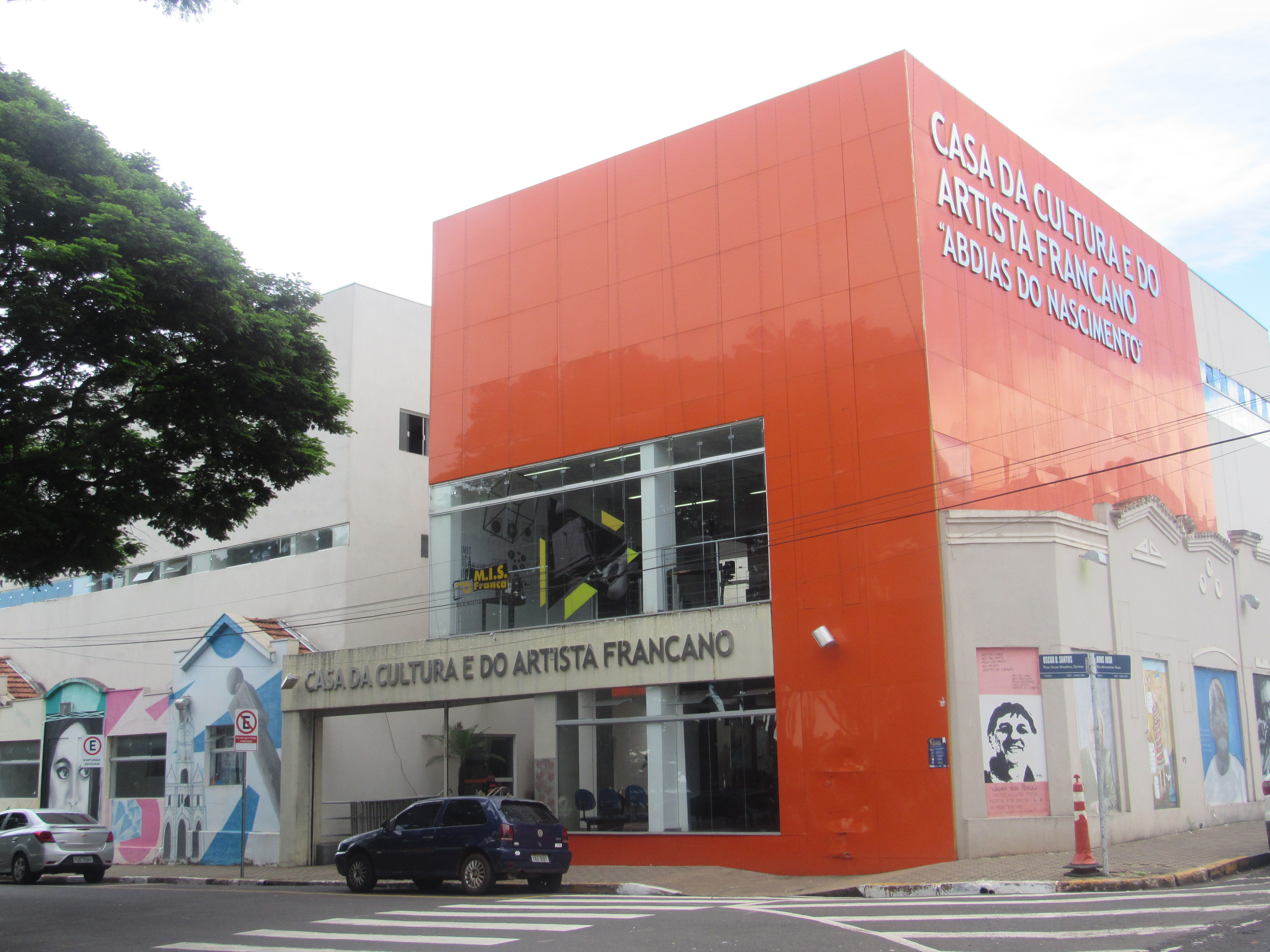 Casa da Cultura e do Artista Francano, Franca (SP), Brasil